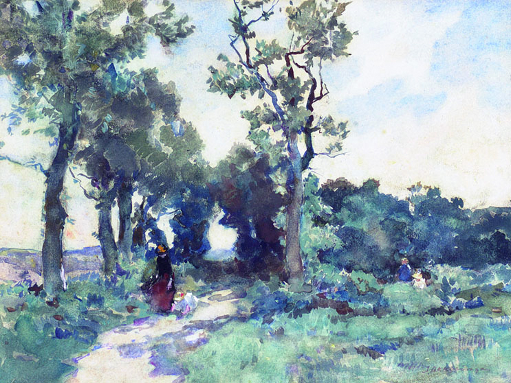 Voorjaar